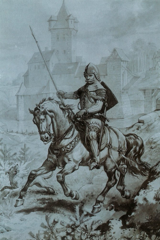 Ritter Berthold und seine Burg Erlangen 1381. Fotografie von Georg Daßler (1836-1919) nach einem verschollenen Glasgemälde, um 1890